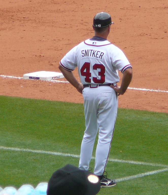 Brian Snitker